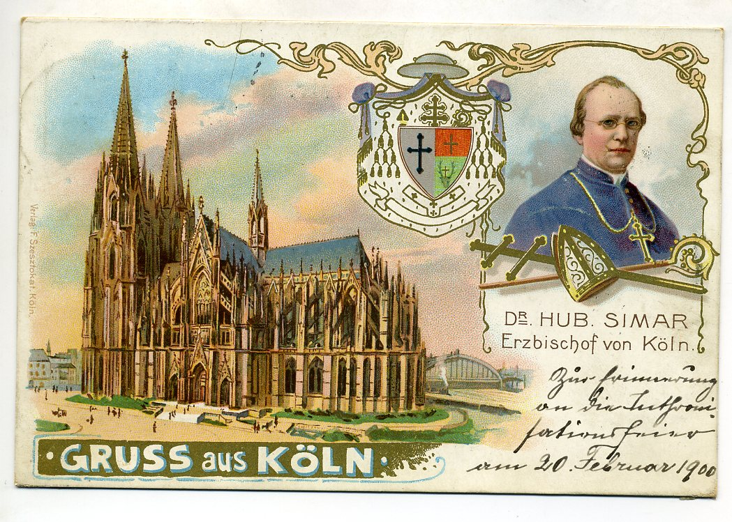 Gruss aus Köln - Hub. Simar -Erzbischof von Köln